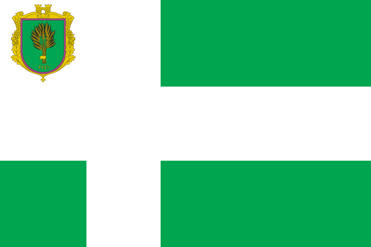 Прапор Носівського району